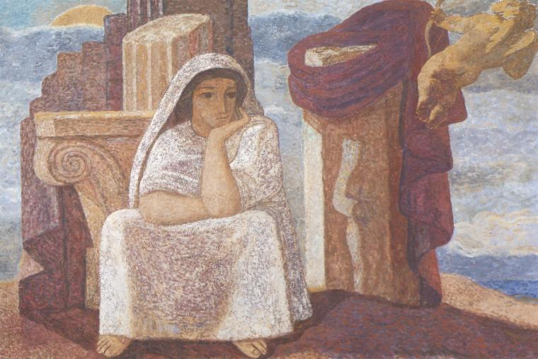 Elektra